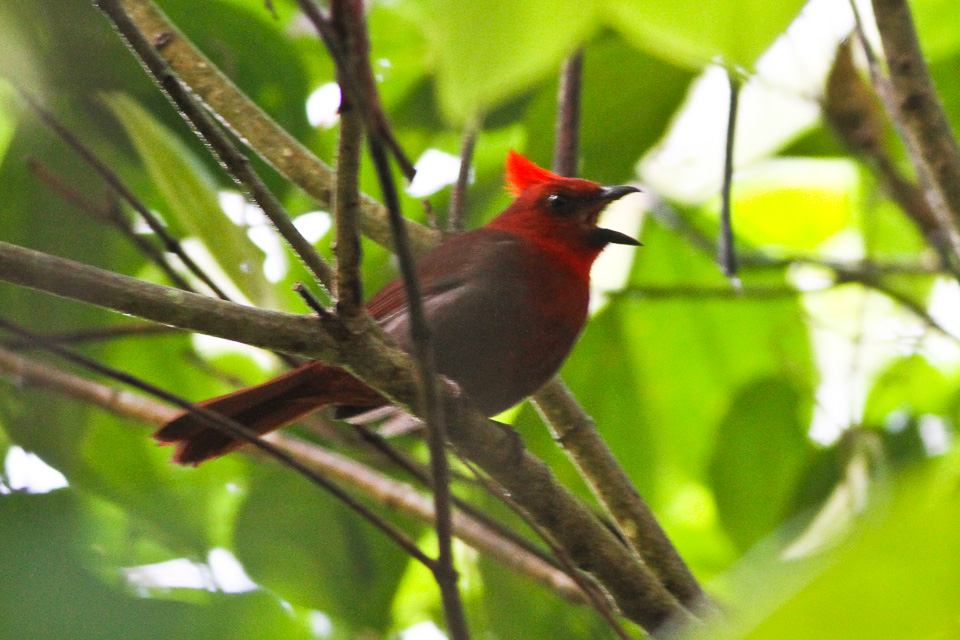 Libano